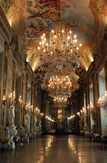 Galleria degli Specchi nel Palazzo Stefano Balbi o Palazzo Reale di Genova